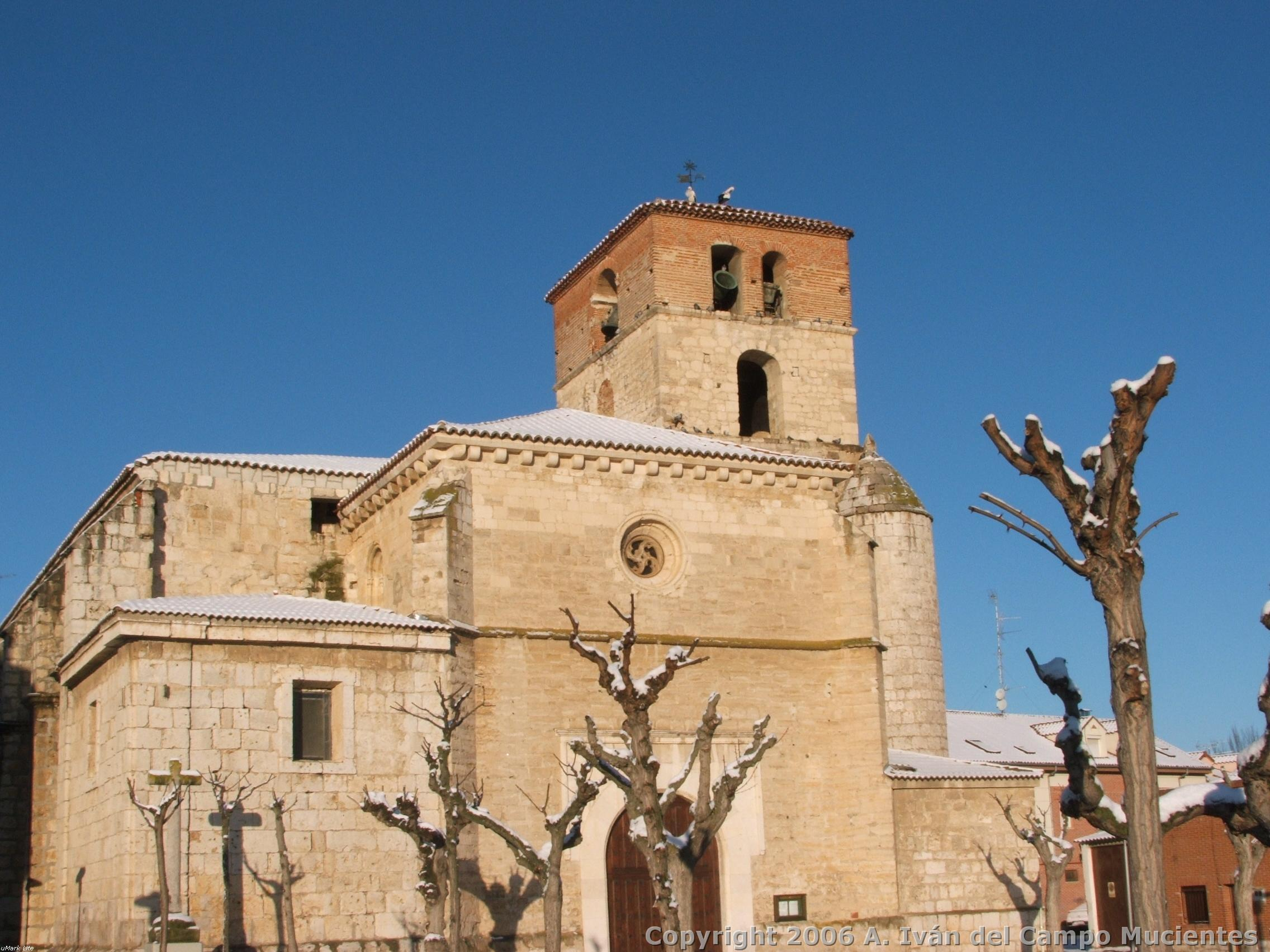 Iglesia de Laguna de Duero (Valladolid) - ESPAÑA